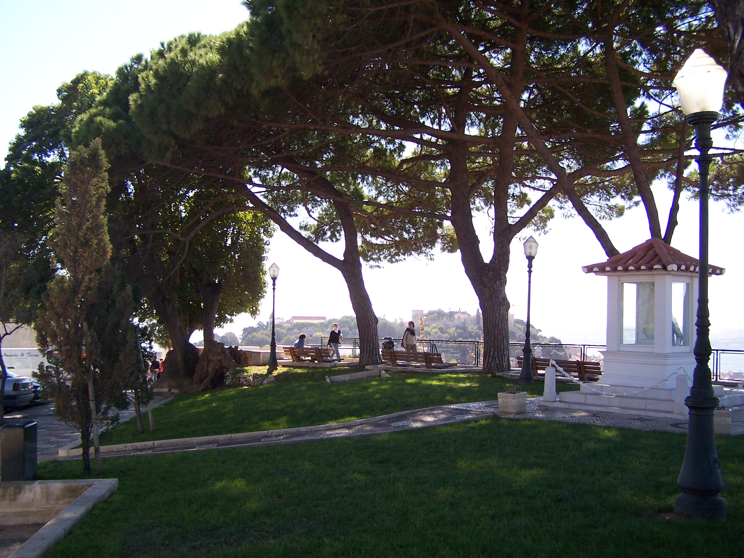 Lisboa - Miradouro Nossa Senhora do Monte / Capela de Nossa Senhora do Monte